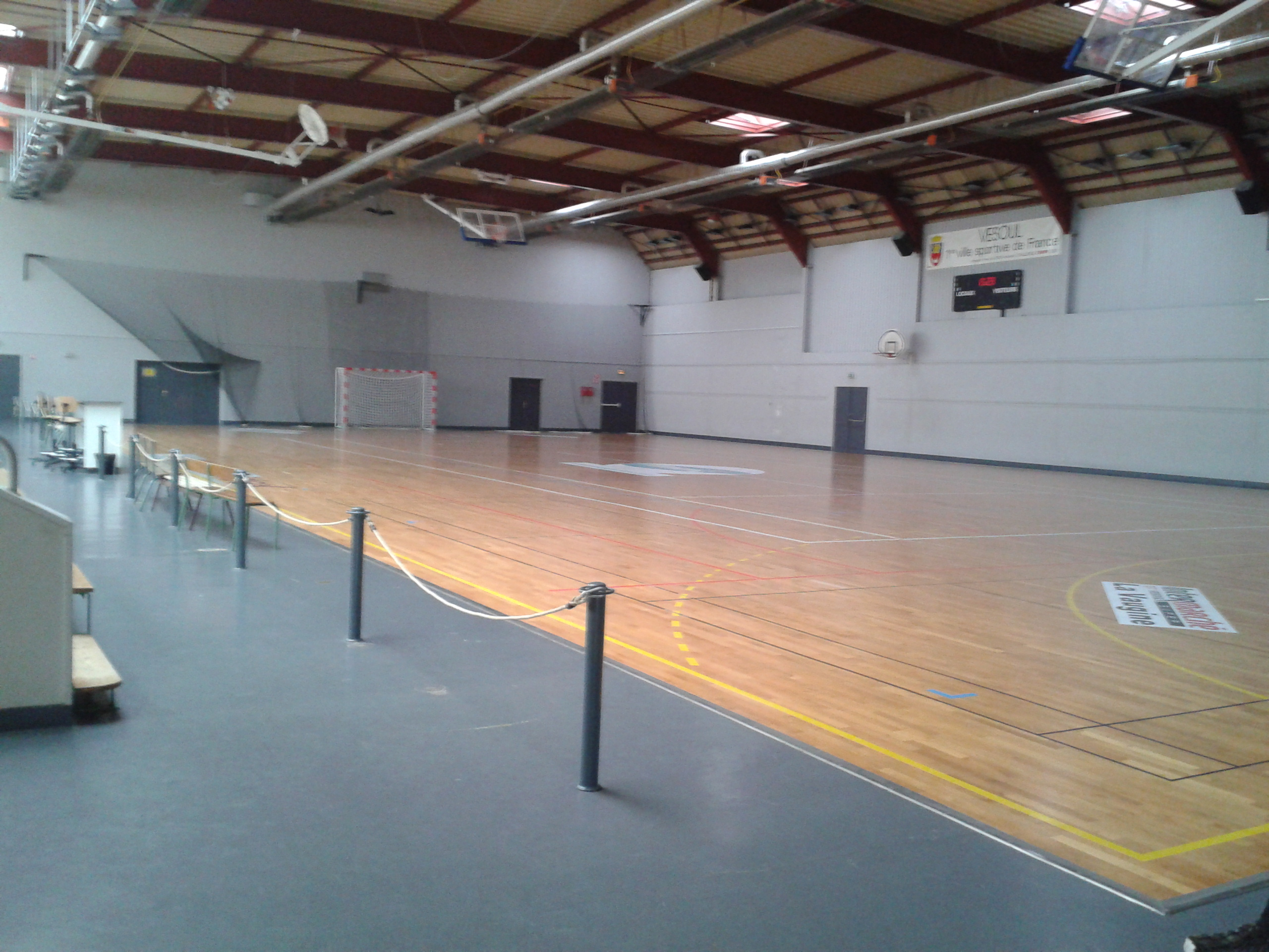 Le gymnase Jean-Jaurès de Vesoul